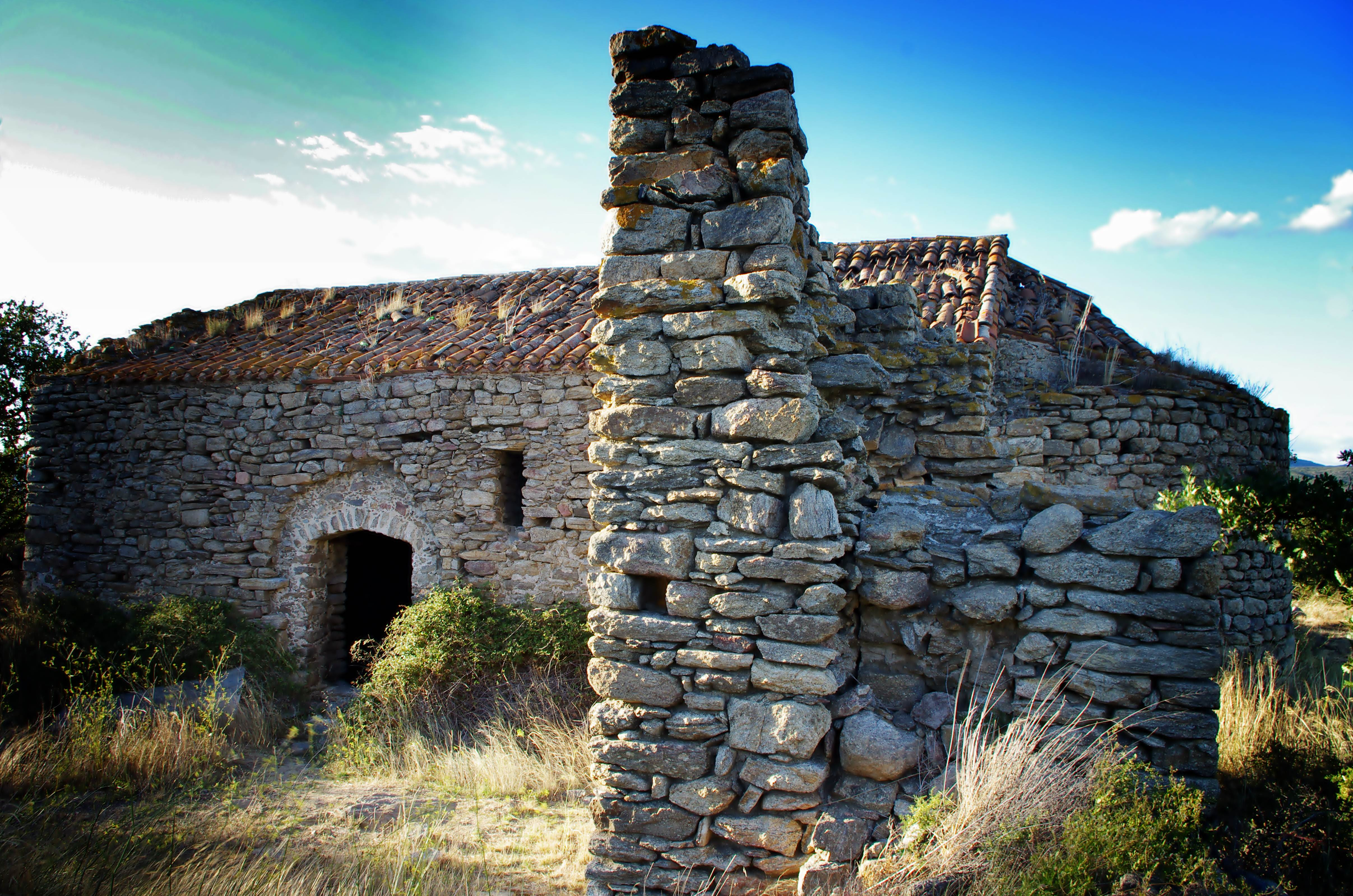 Chapelle Saint Martin entre les villages de Latour de France et Cassagnes . Région: Roussillon Epoque :12ème - 13ème siècle